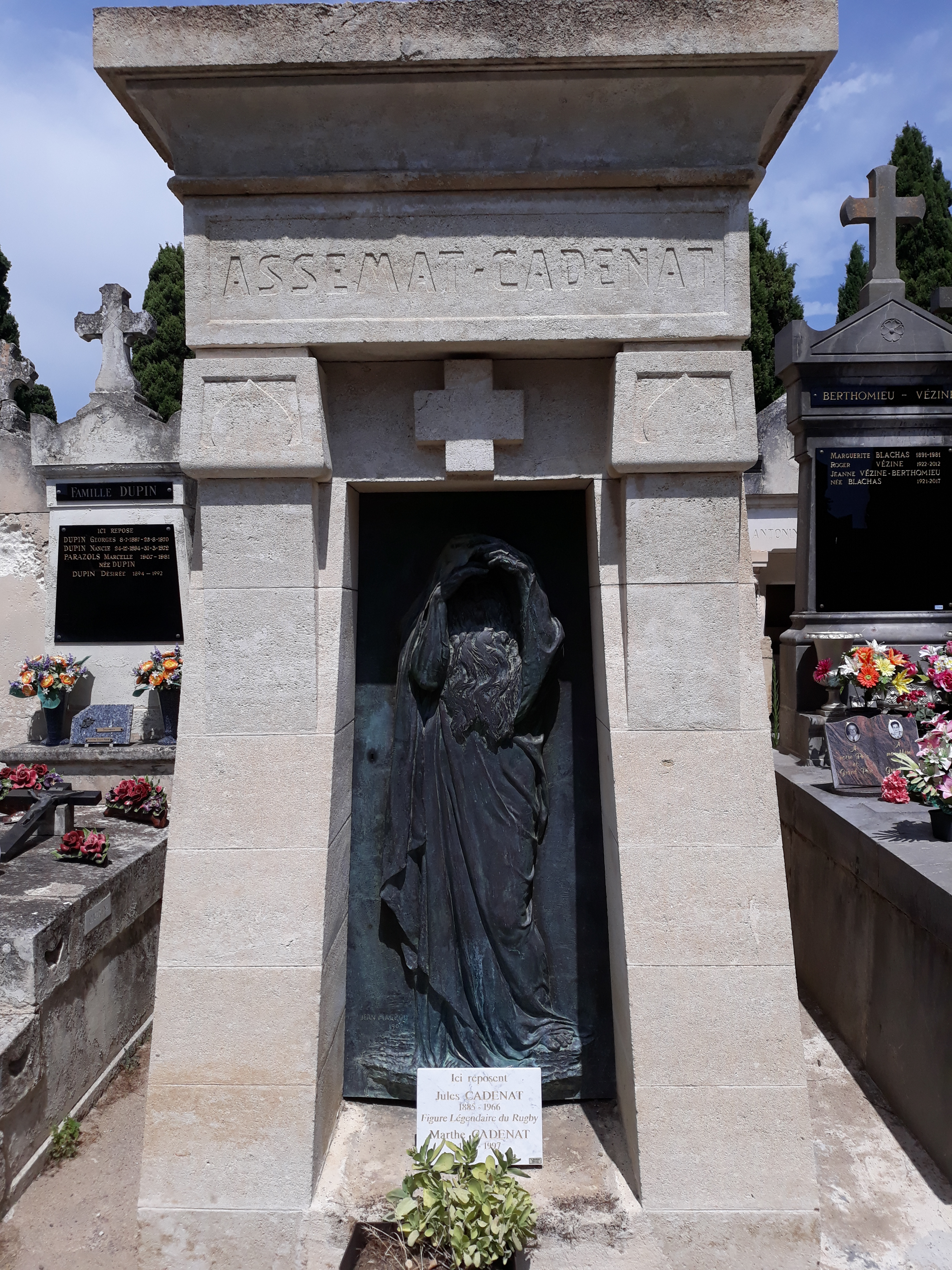 Das Grab des französischen Rugbyspielers Jules Cadenat auf dem alten Friedhof von Béziers (Hérault).